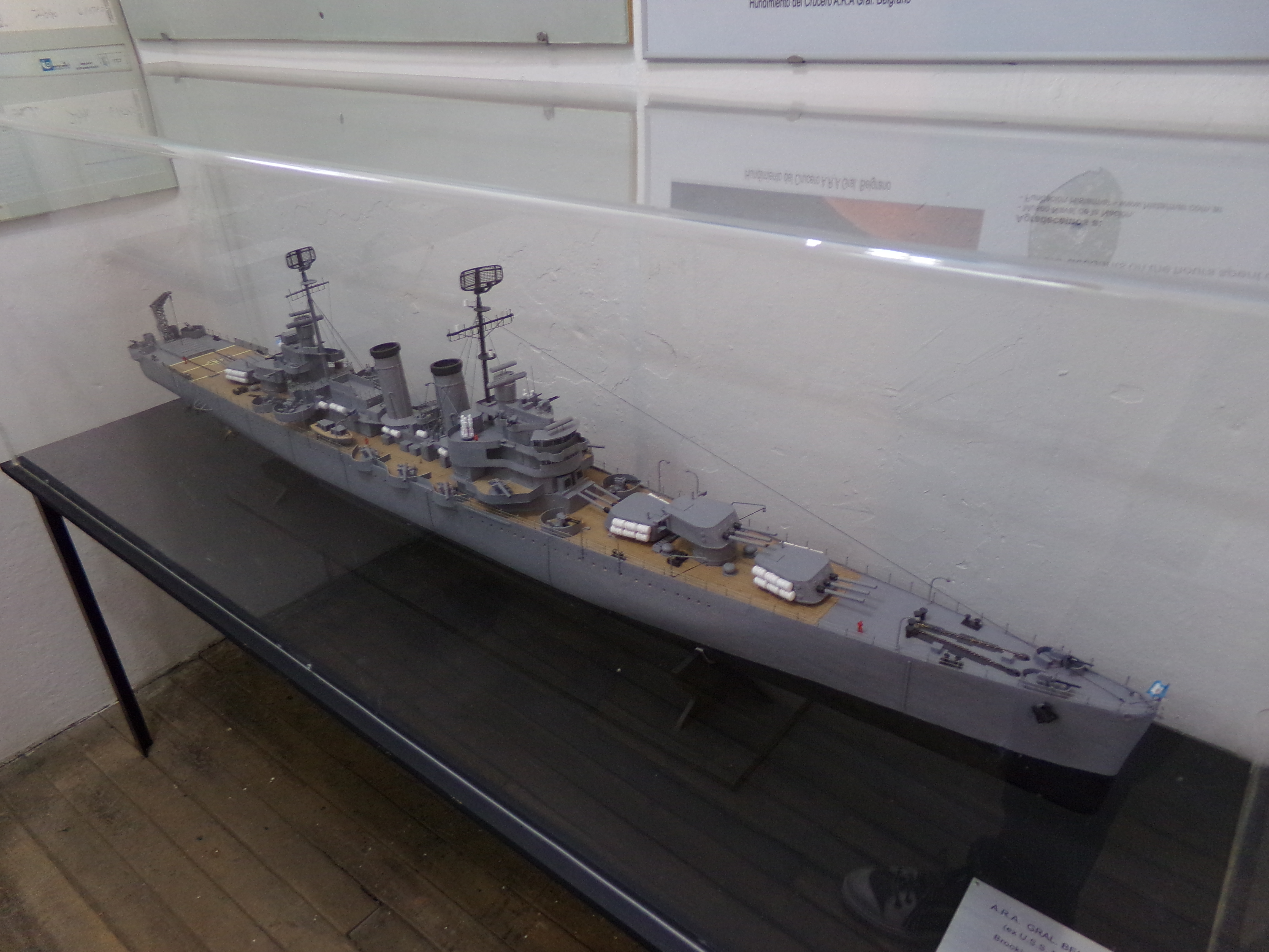 Museo Maritimo y Ex Presidio de Ushuaia, TDF, Arg